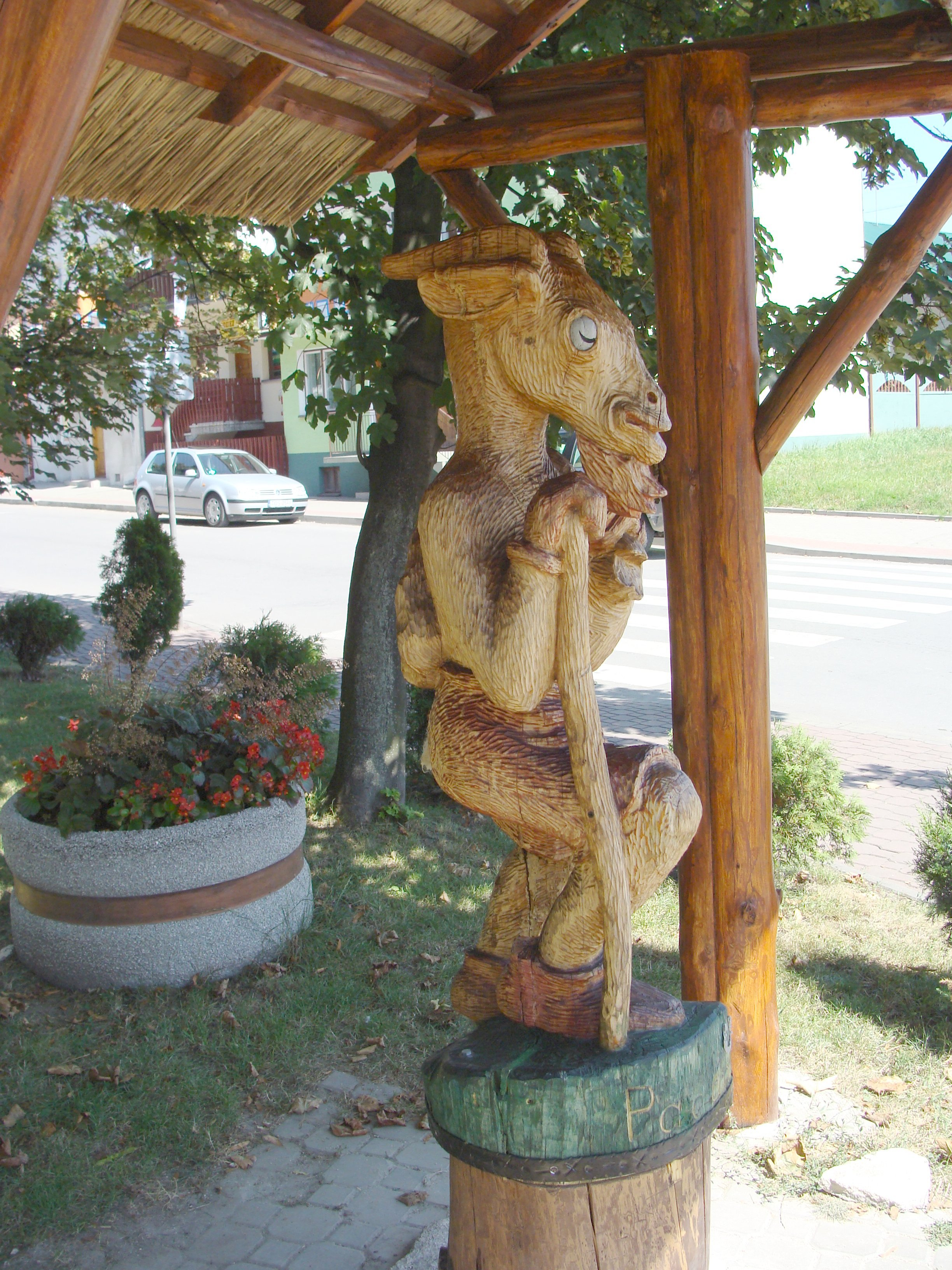 Koziołek Matołek w Pacanowie